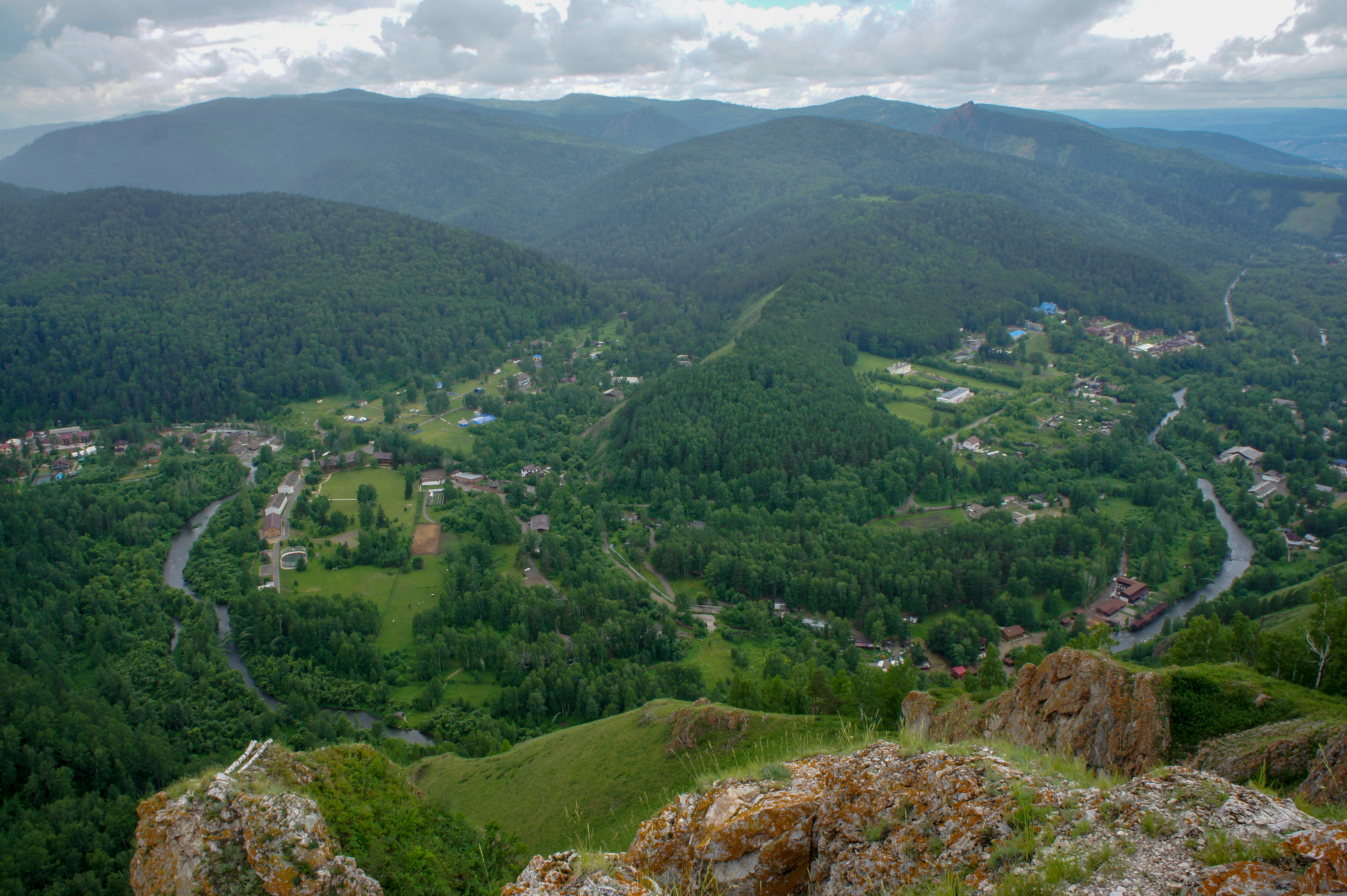 Базаихский разрез: Березовский район, Красноярский край Изгибающаяся петлёй река Базаиха прямо напротив Базаихского разреза — исследуемый разрез находится ниже по склону от места фотографирования. This image is related to the protected area of Russia number 2410028